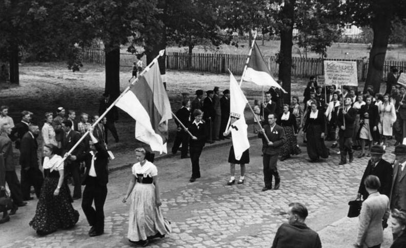 Spreefurt, Kongress der sorbischen Arbeitsbrigaden ADN-ZB-Vitanova Kongress der sorbischen Arbeitsbrigaden vom 19.-22.8.1948 in Spreefurt. Aufzug der Festteilnehmer.